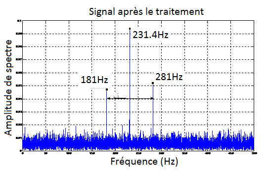 Figure créeé par l'auteur: Signal apres le traitement